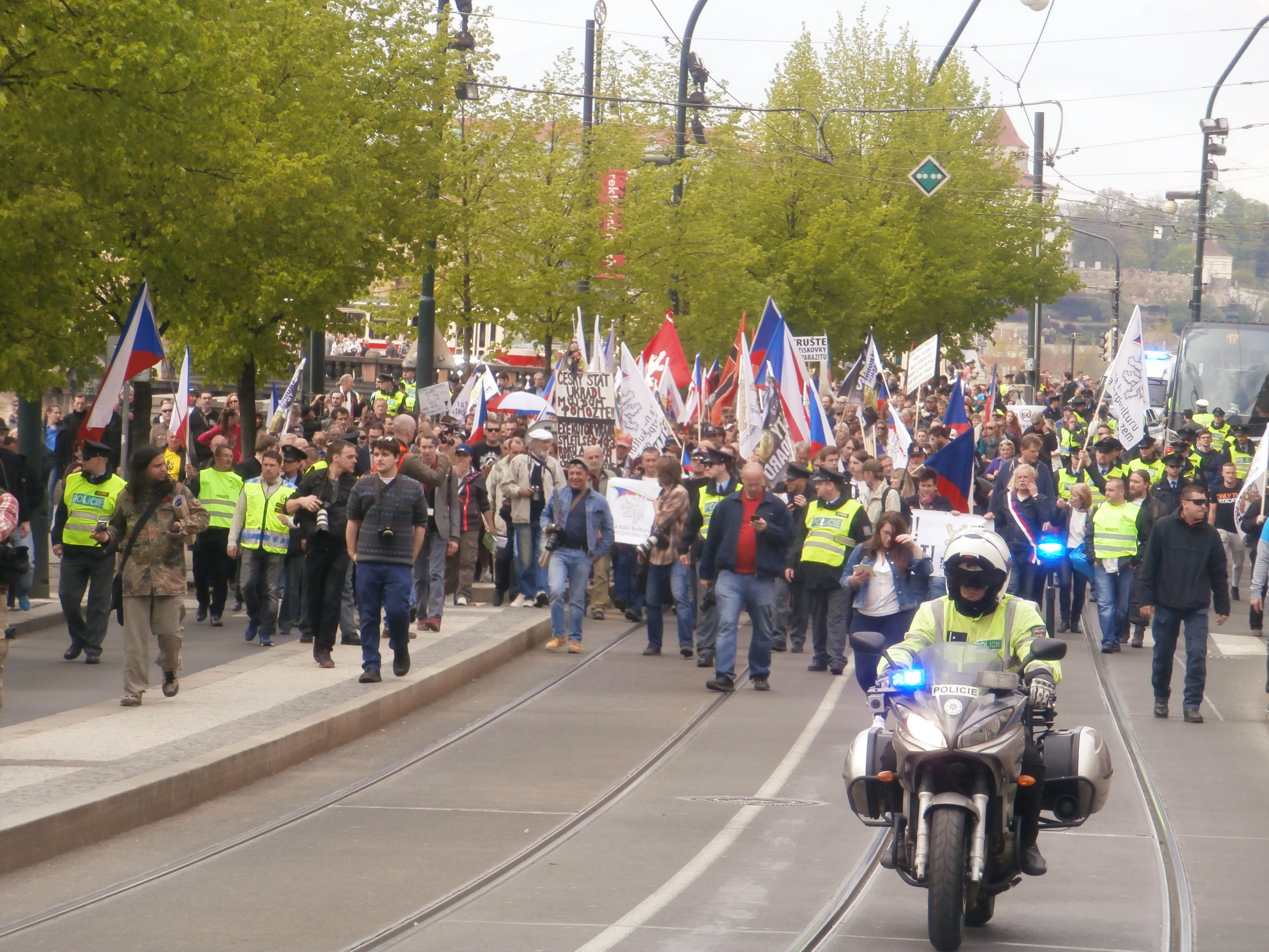 Pochod sympatizantů strany Národní demokracie po Masarykově nábřeží,1. 5. 2016